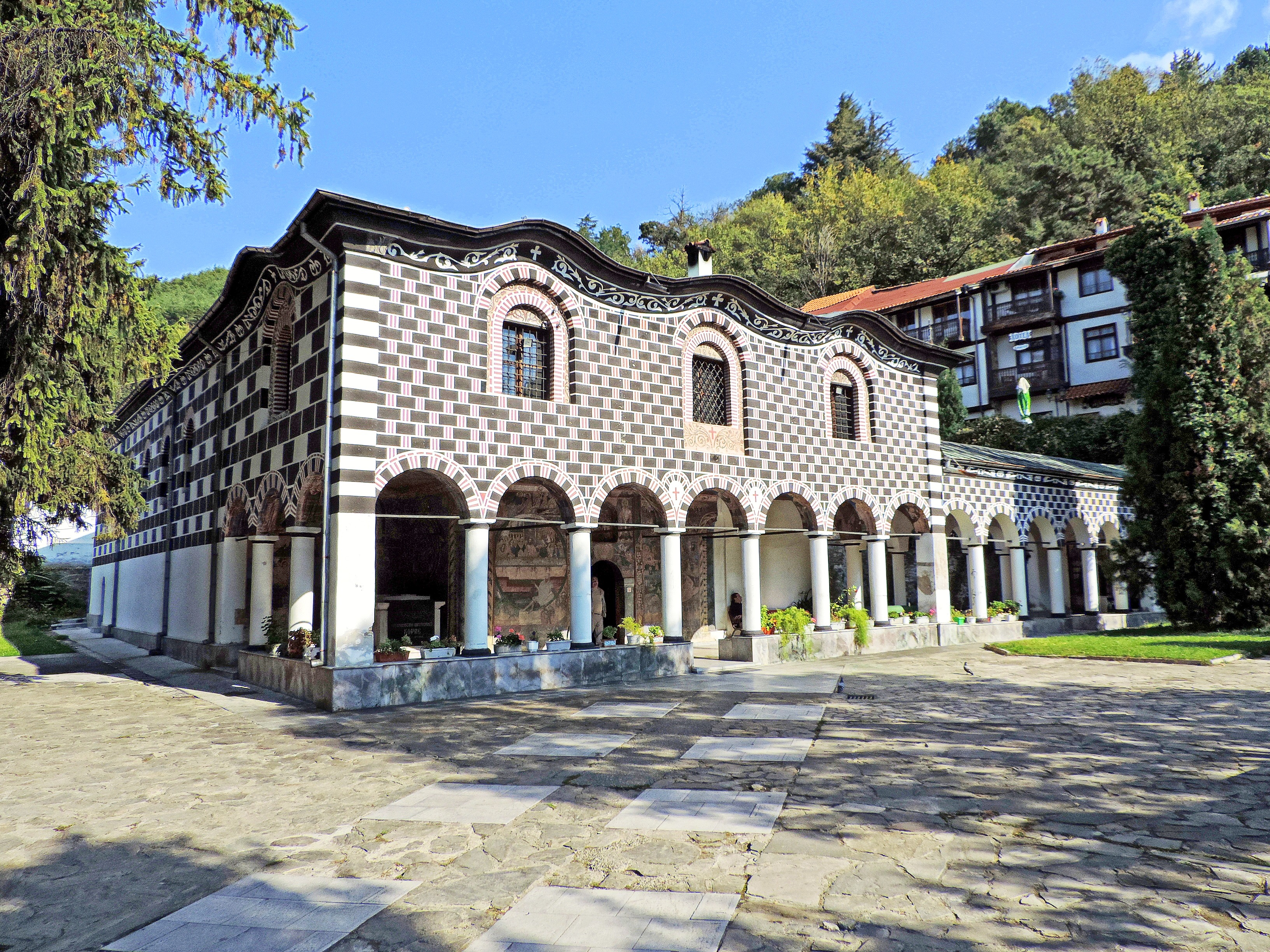 Църквата „Въведение Богородично“ в Благоевград